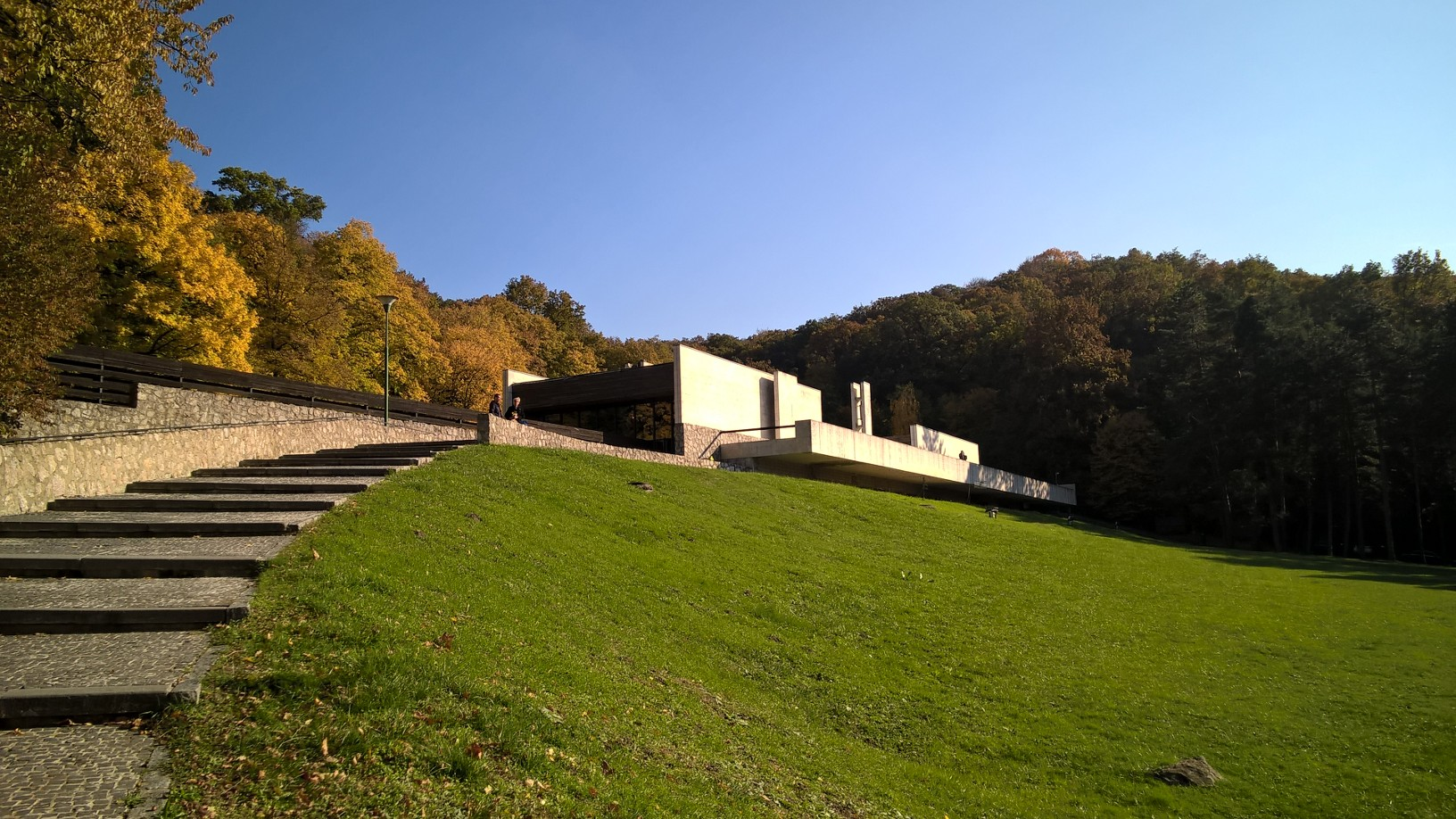 Pohled na krematorium